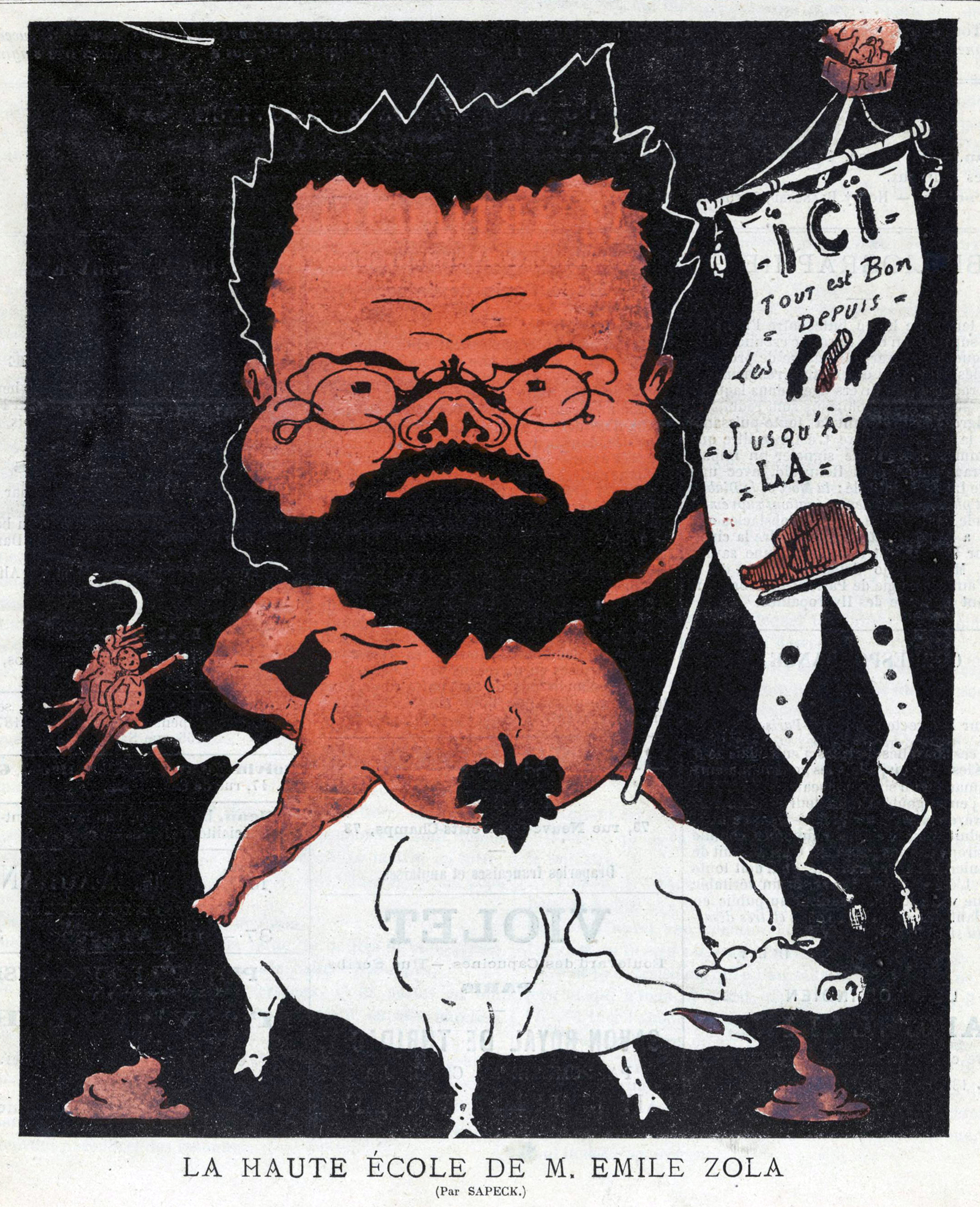 Caricature publiée dans Tout-Paris, supplément de L'Hydropathe.